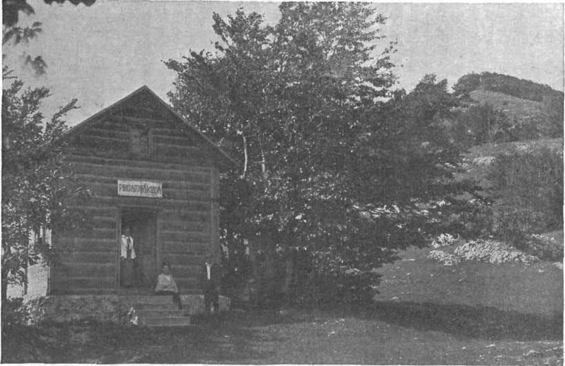 Pirnatova koča na Javorniku.